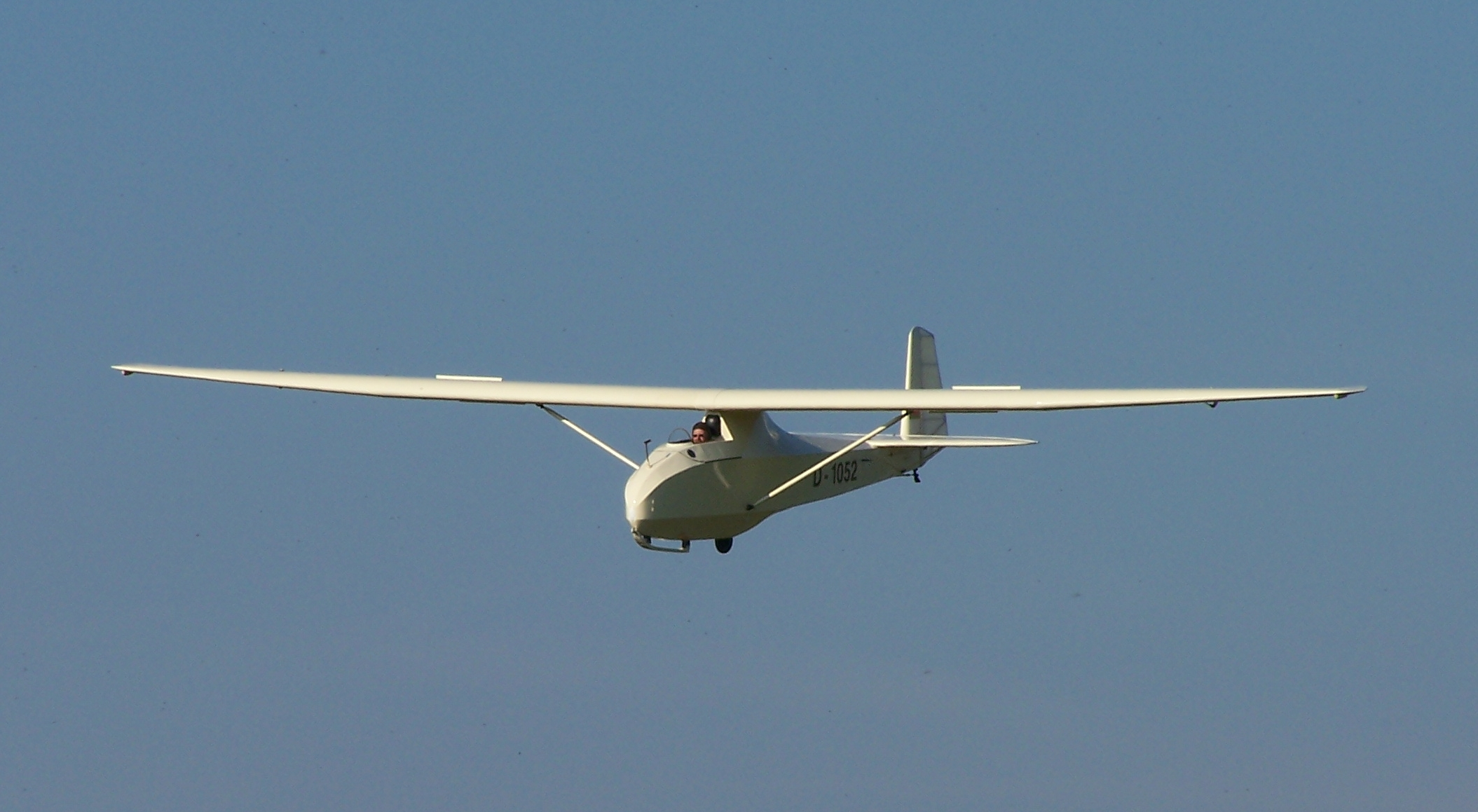 Grunau Baby III D-1052 im Landeanflug am Verkehrslandeplatz EDMB